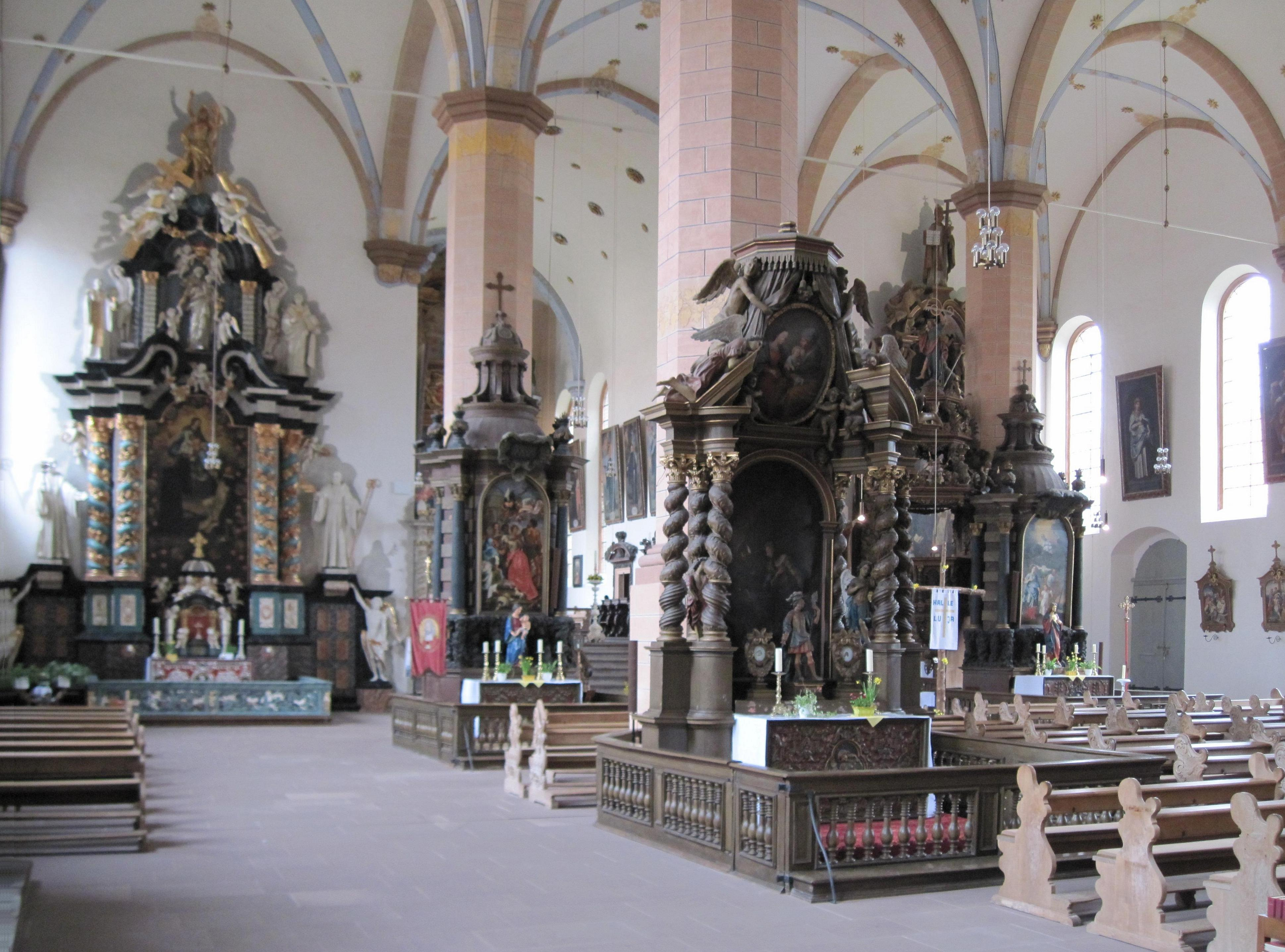 Lamspringe, Klosterkirche, Inneres, linkes Seitenschiff